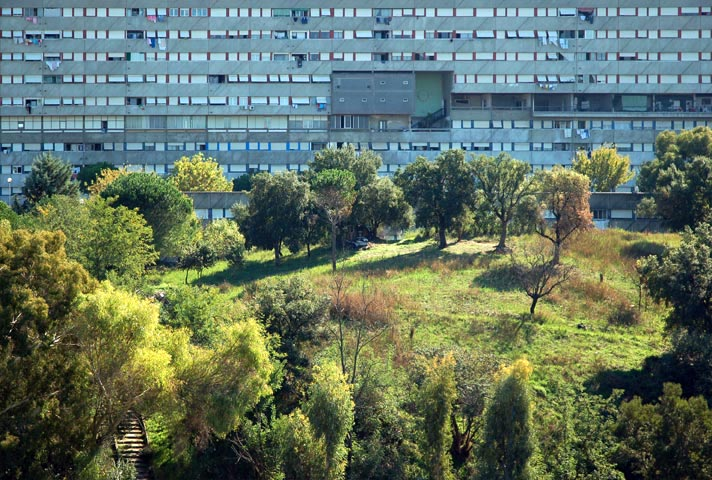 Corviale, Roma